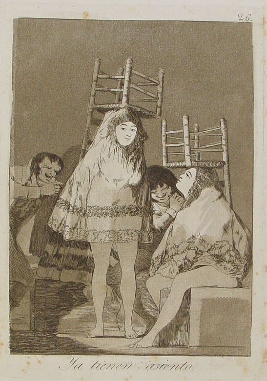 Capricho nº 26: Ya tienen asiento de Goya, serie Los Caprichos